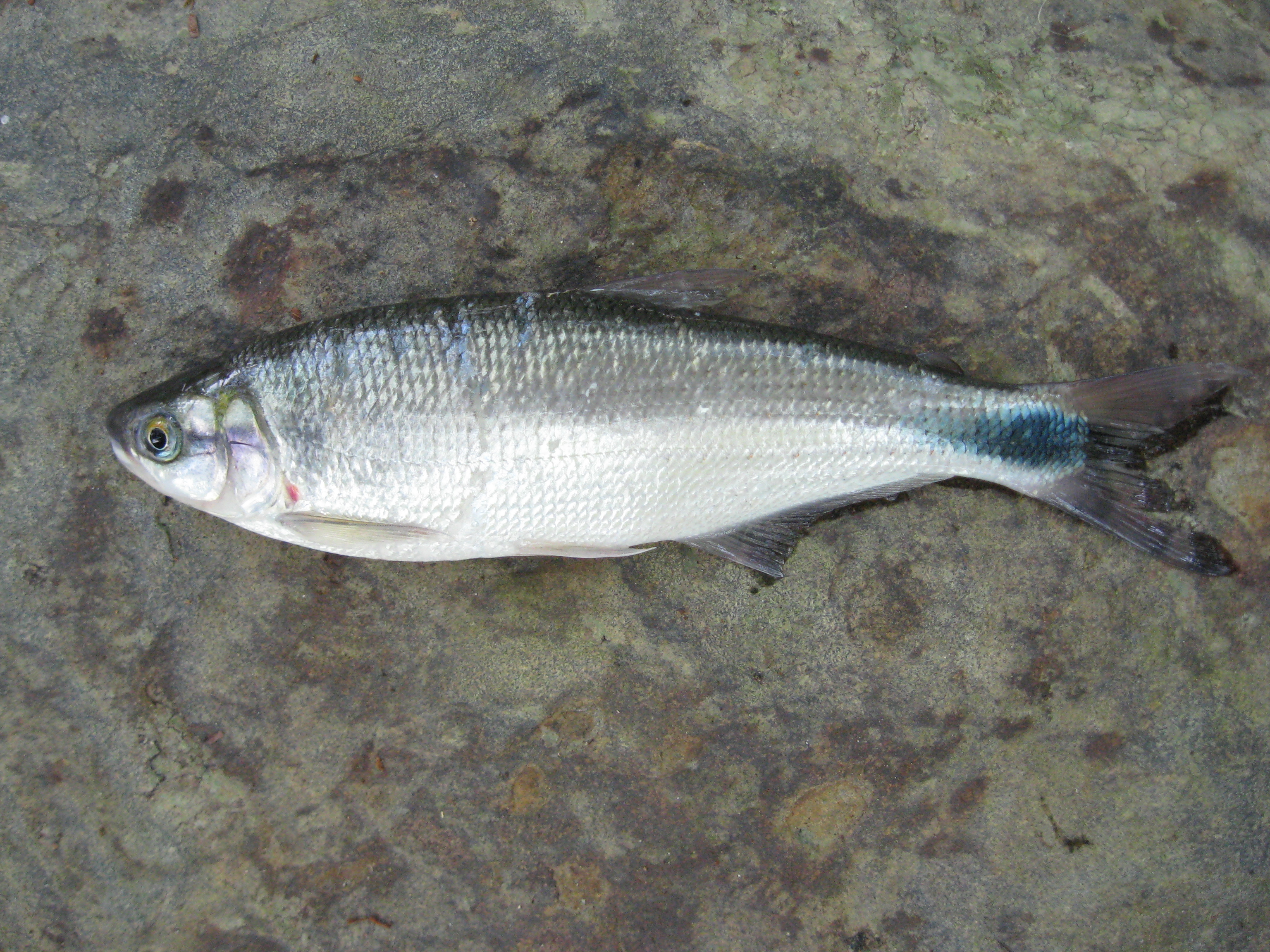 Brycon rubricauda